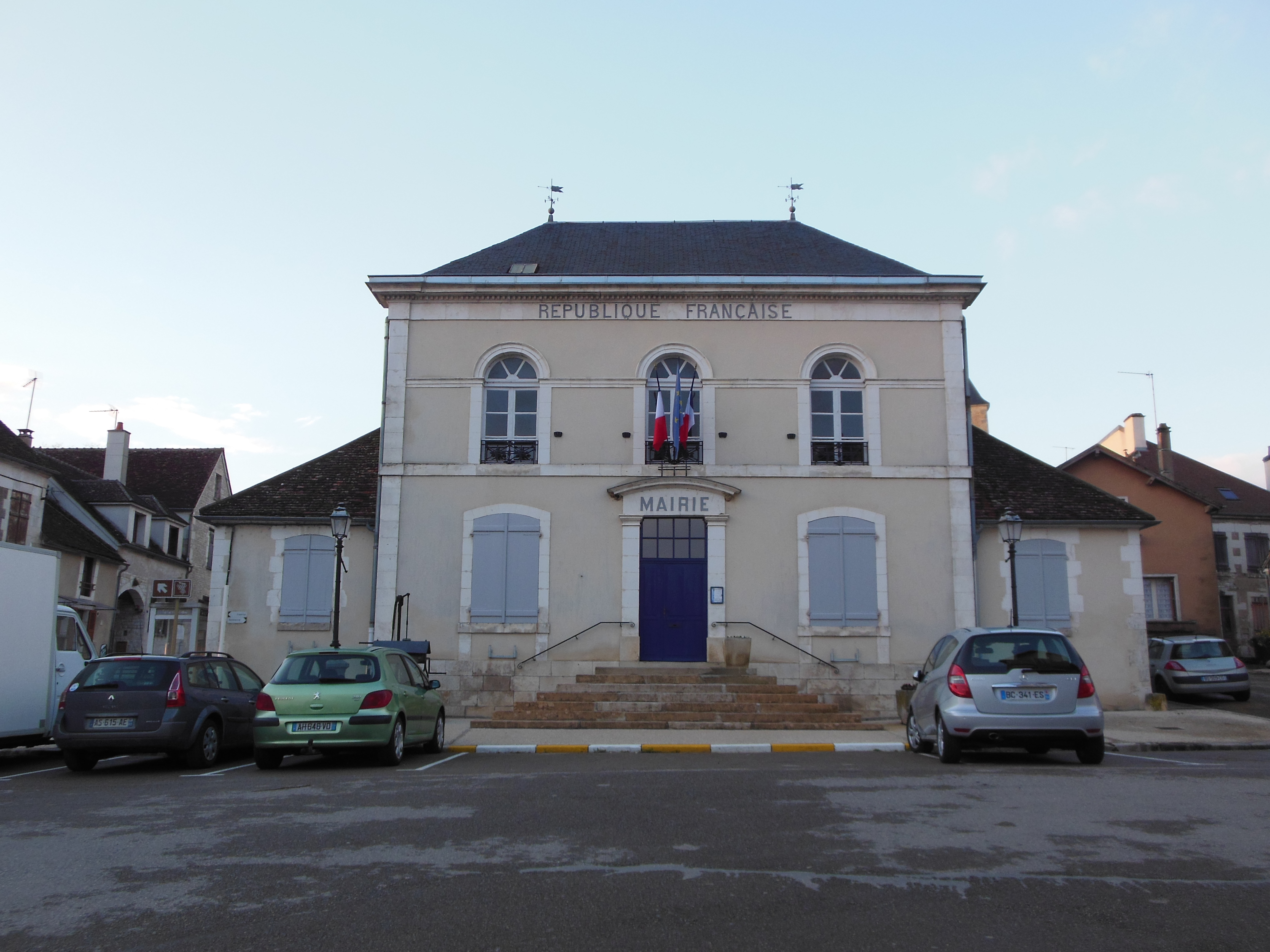 Mairie de Cravant (Yonne).